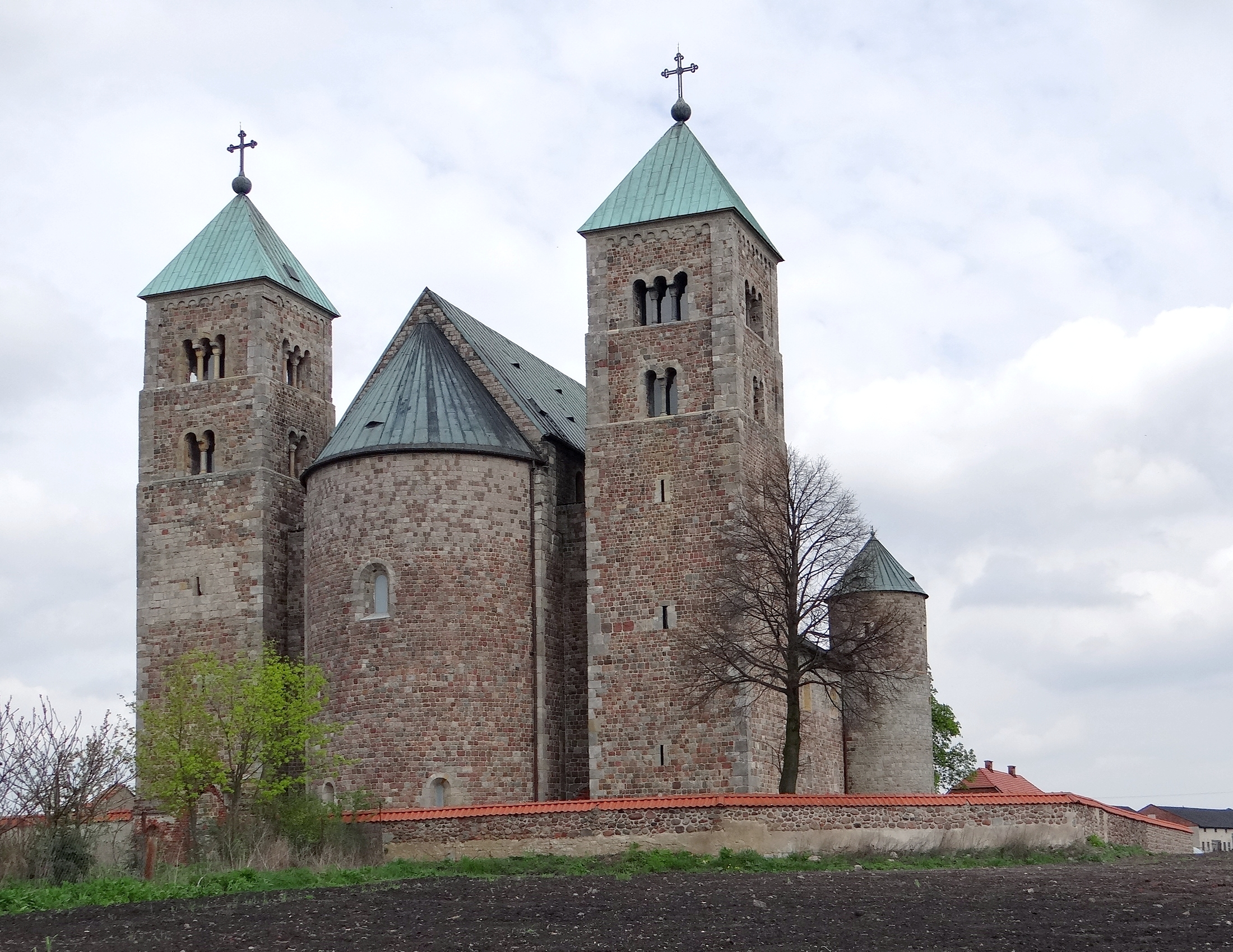 Tum, kolegiata p.w. NMP i św. Aleksego, 1161, XV, XVIII, 1952